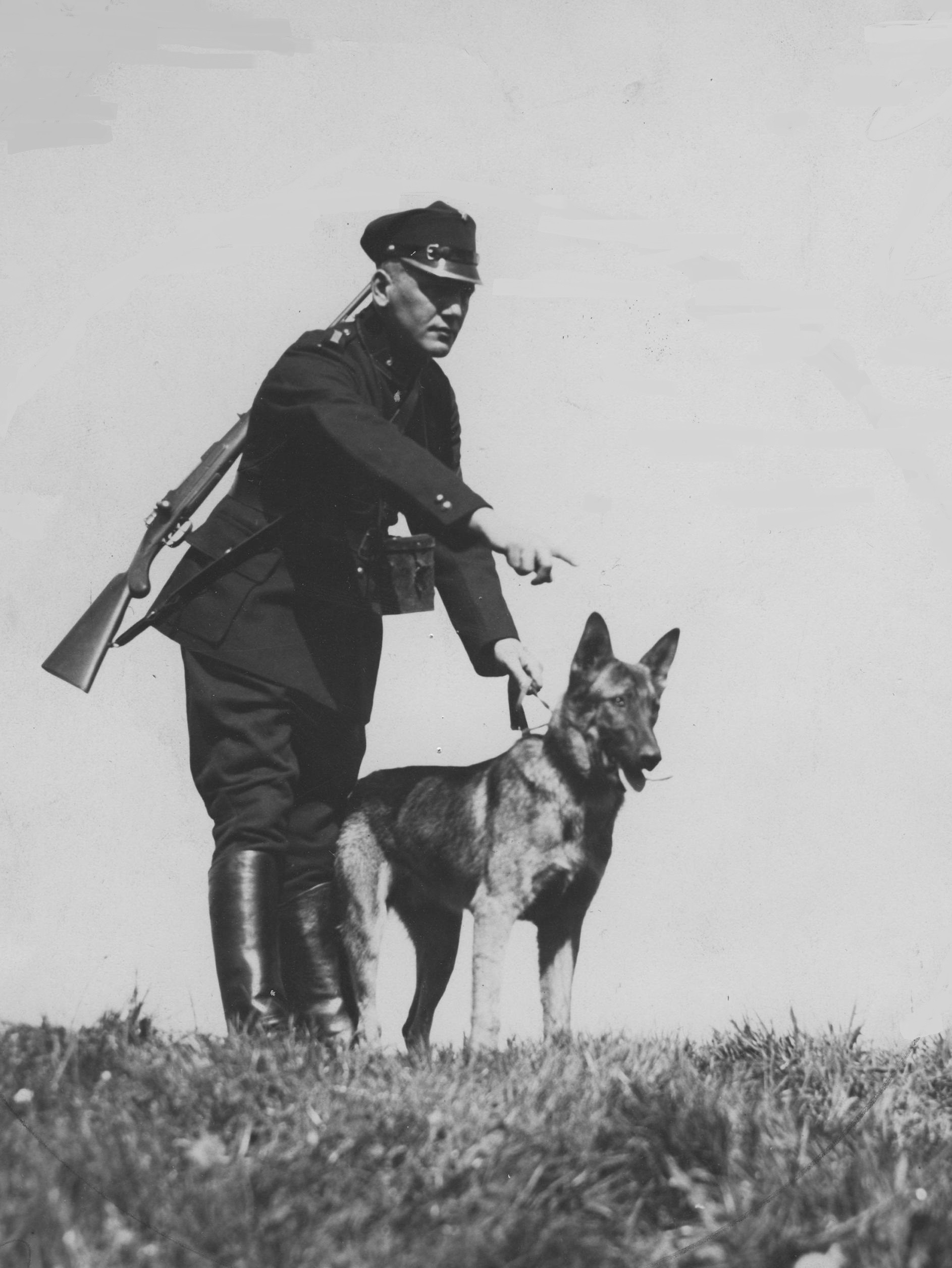 Funkcjonariusz Straży Celnej na patrolu z psem. Koncern Ilustrowany Kurier Codzienny - Archiwum Ilustracji. Sygnatura: 1-G-6484